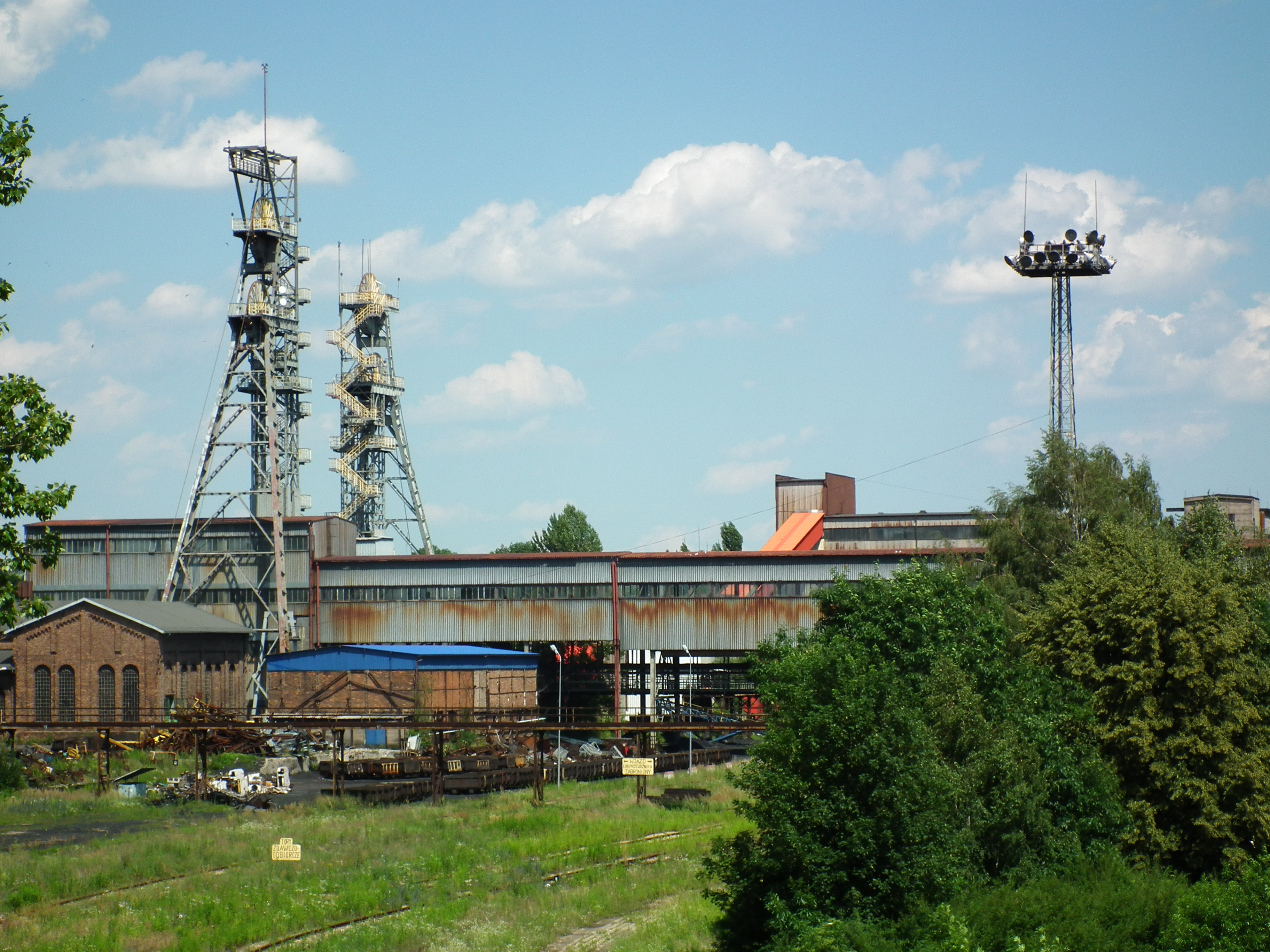 Kopalnia Kazimierz Juliusz w Sosnowcu.